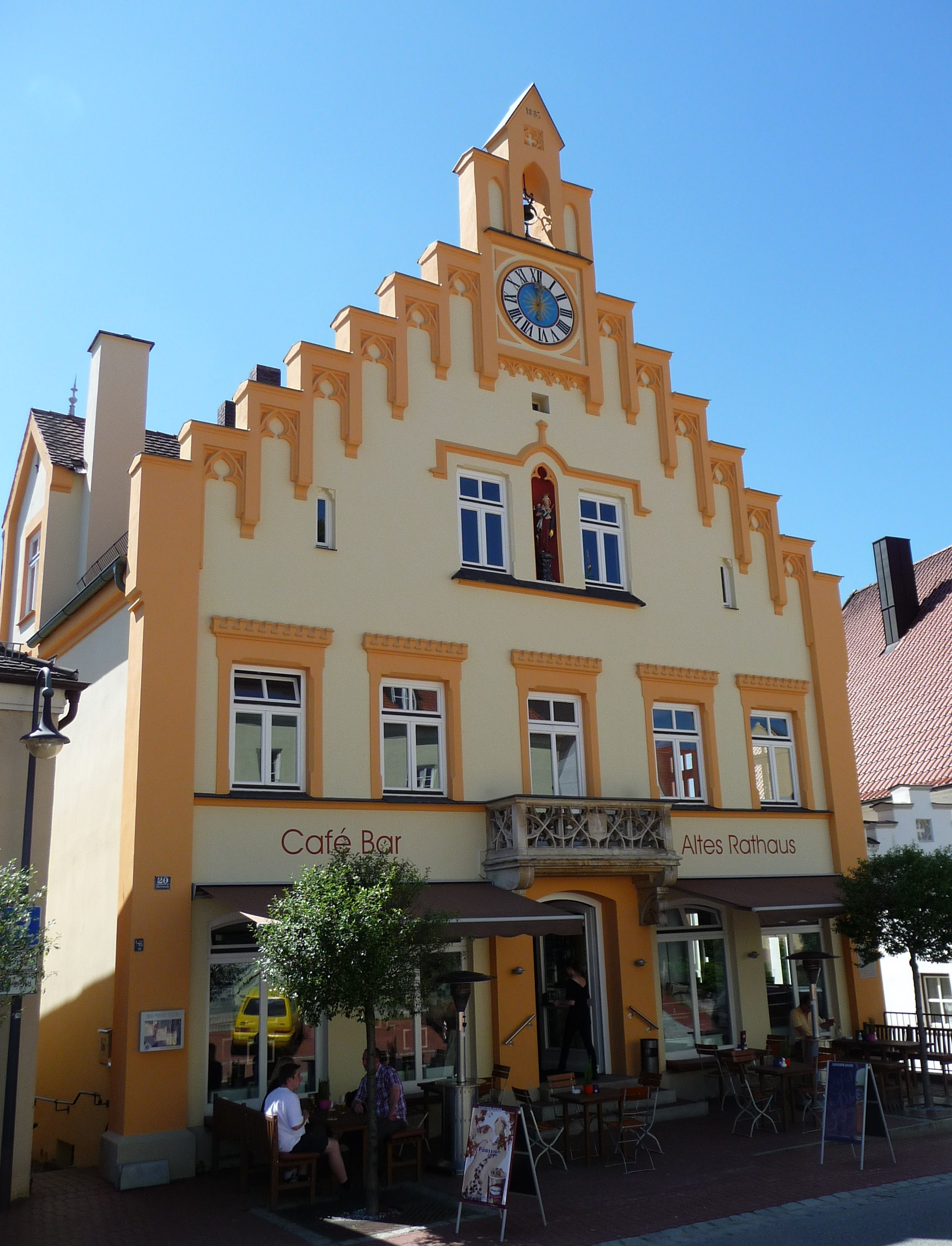 Das Alte Rathaus in Rottenburg an der Laaber